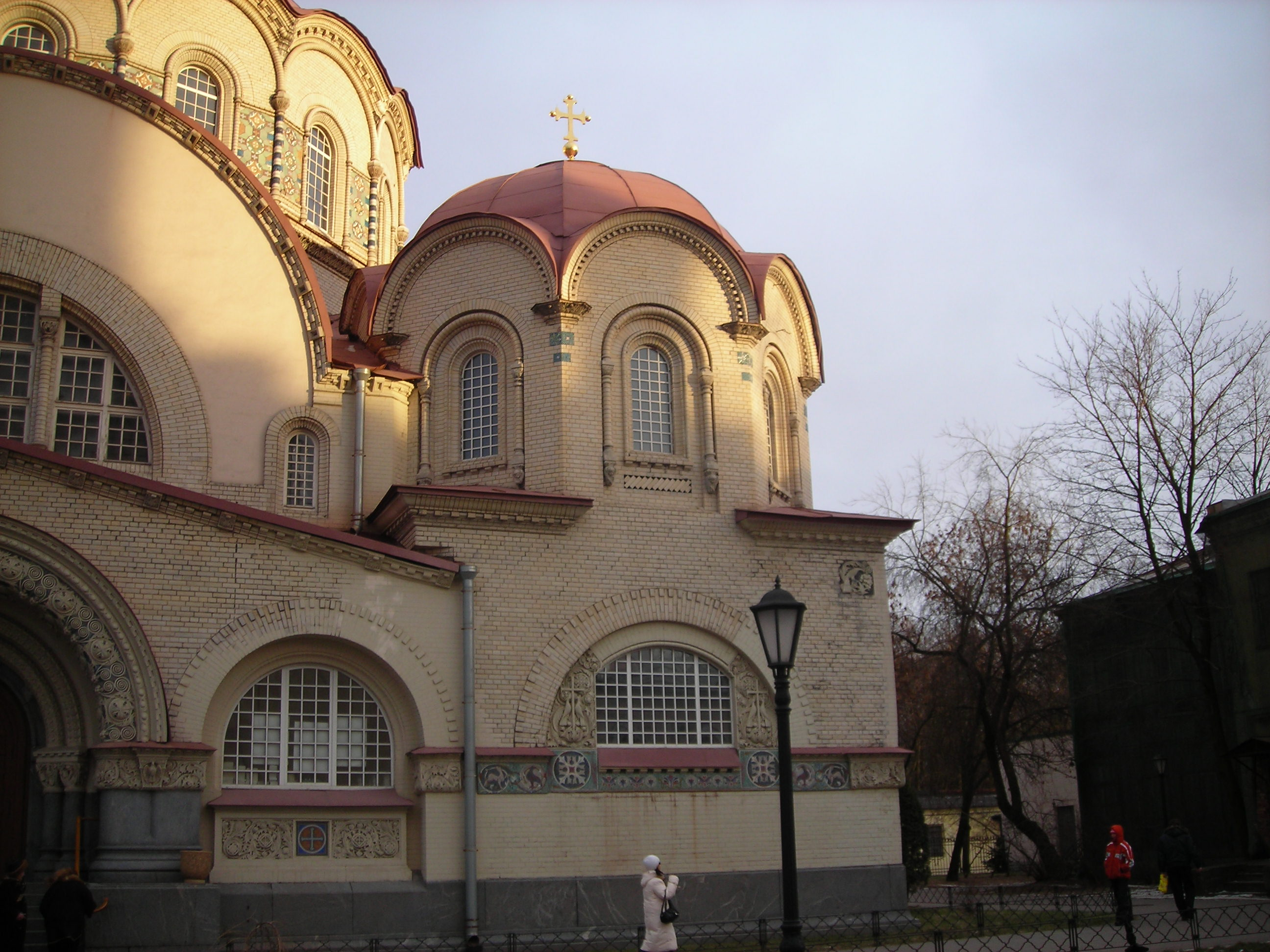 Dome of Kazan church in Voskresensky Novodevichy monastery